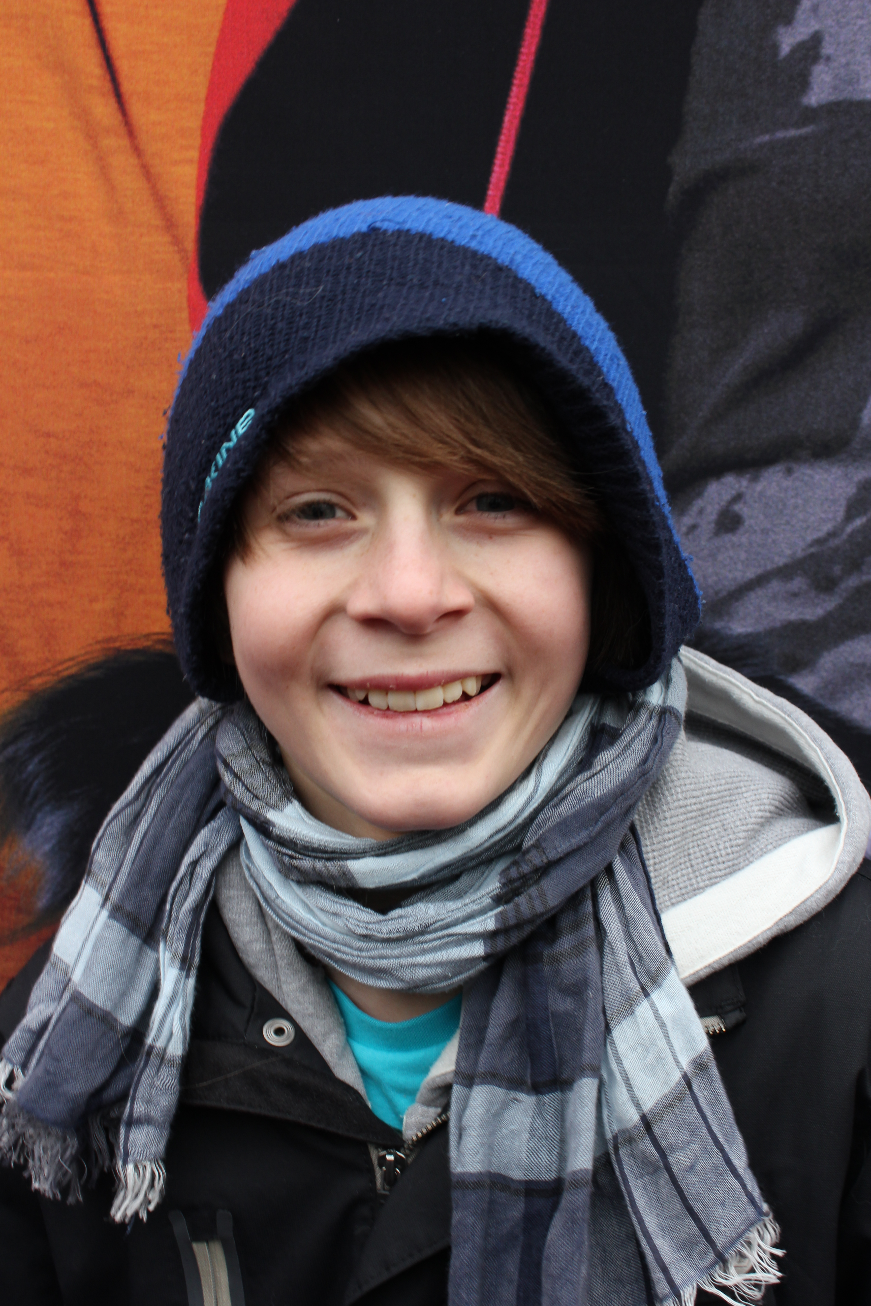 Portrait-Aufnahme von Justus Schlingensiepen bei der Schleswigpremiere des Fünf Freunde Films (28. Januar 2012).